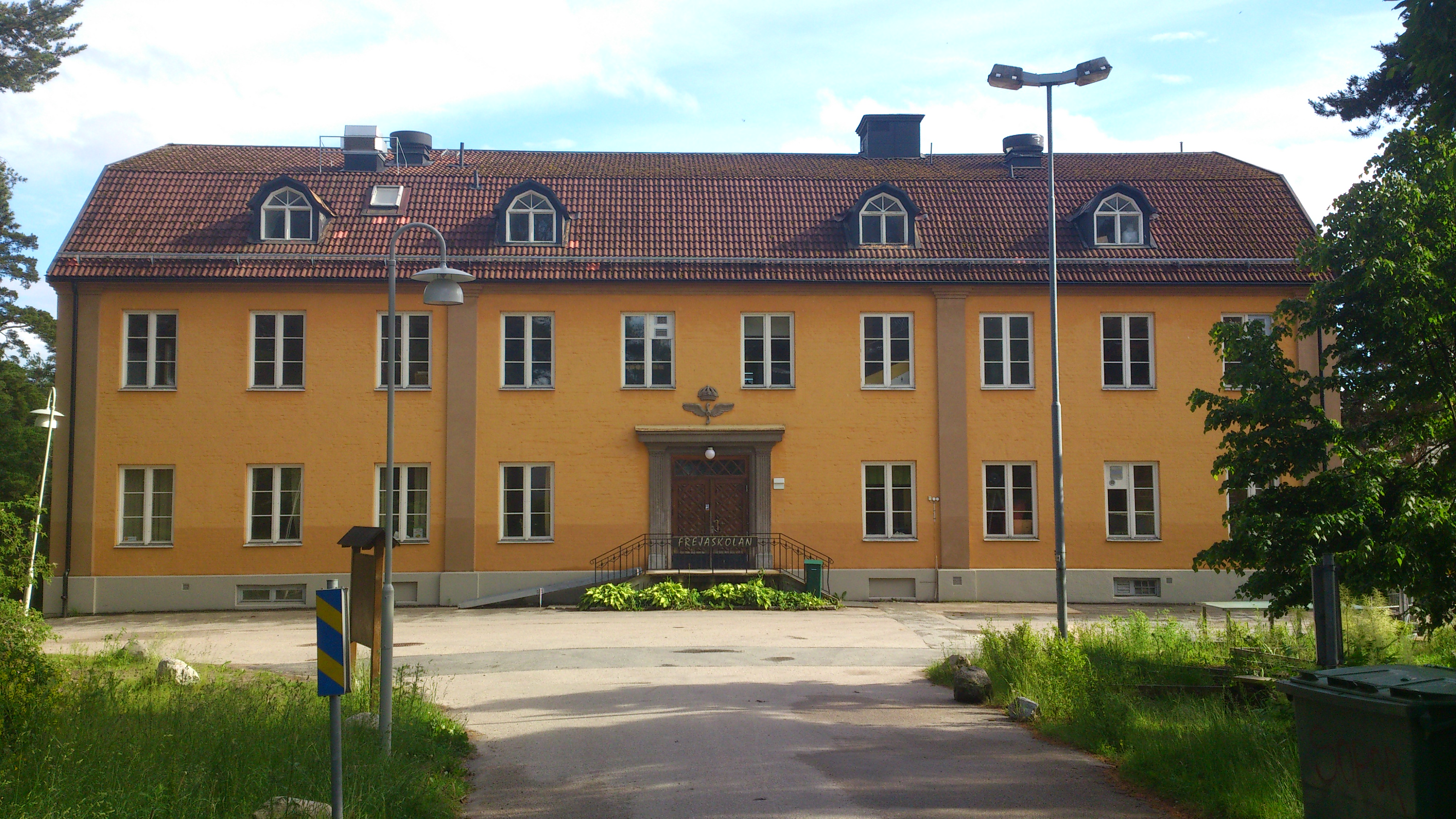 Kanslihuset uppfört 1929, vid f.d Roslagens flygflottilj eller även känt som F 2 Hägernäs.